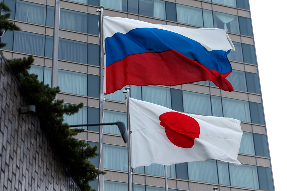 Визит Министра обороны России генерала армии Сергея Шойгу в Токио на переговоры с японским коллегой Томоми Инадой (г. Токио, Япония)